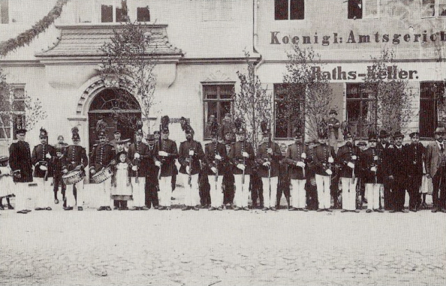 Die Schützengilde von Elsterwerda vor dem örtlichen Rathaus